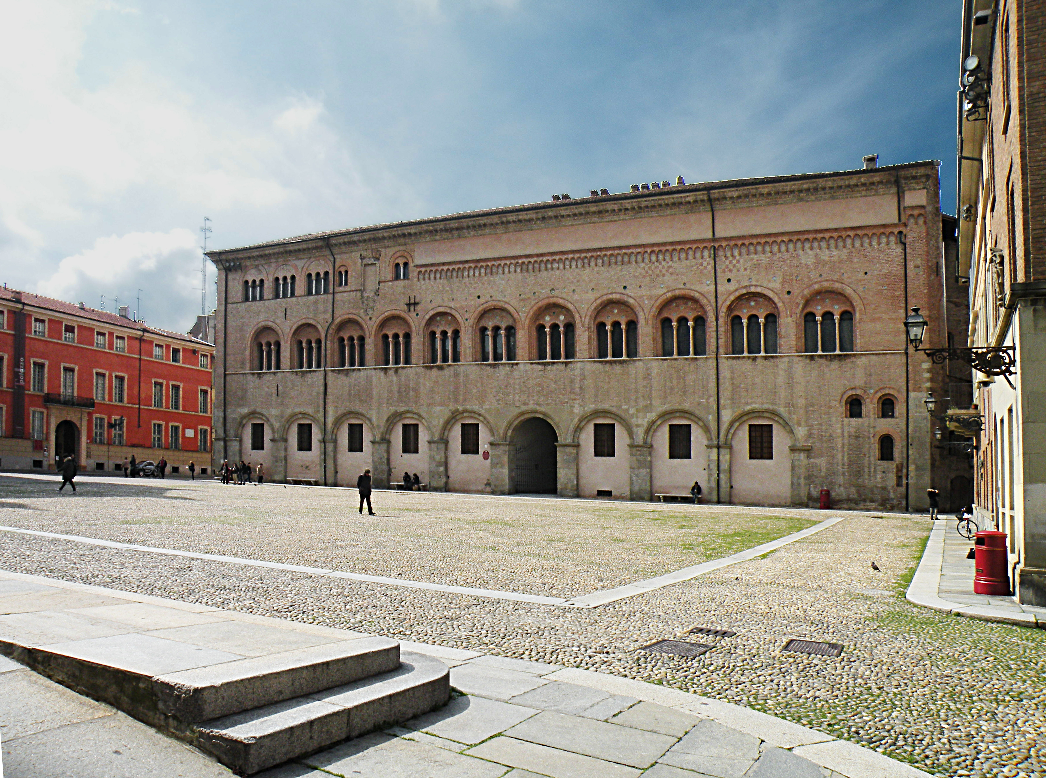 Дворец епископа (Парма)